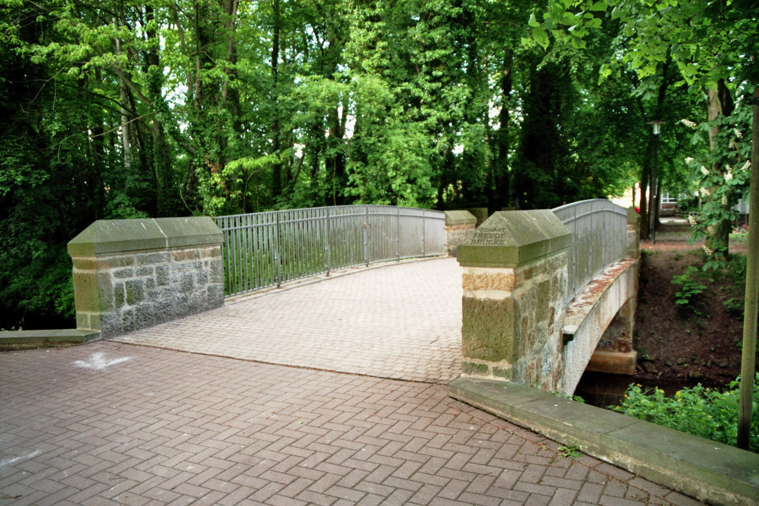 Die Dechant-Freude-Brücke über die Bevergerner Aa in Bevergern, Nordrhein-Westfalen, Deutschland.